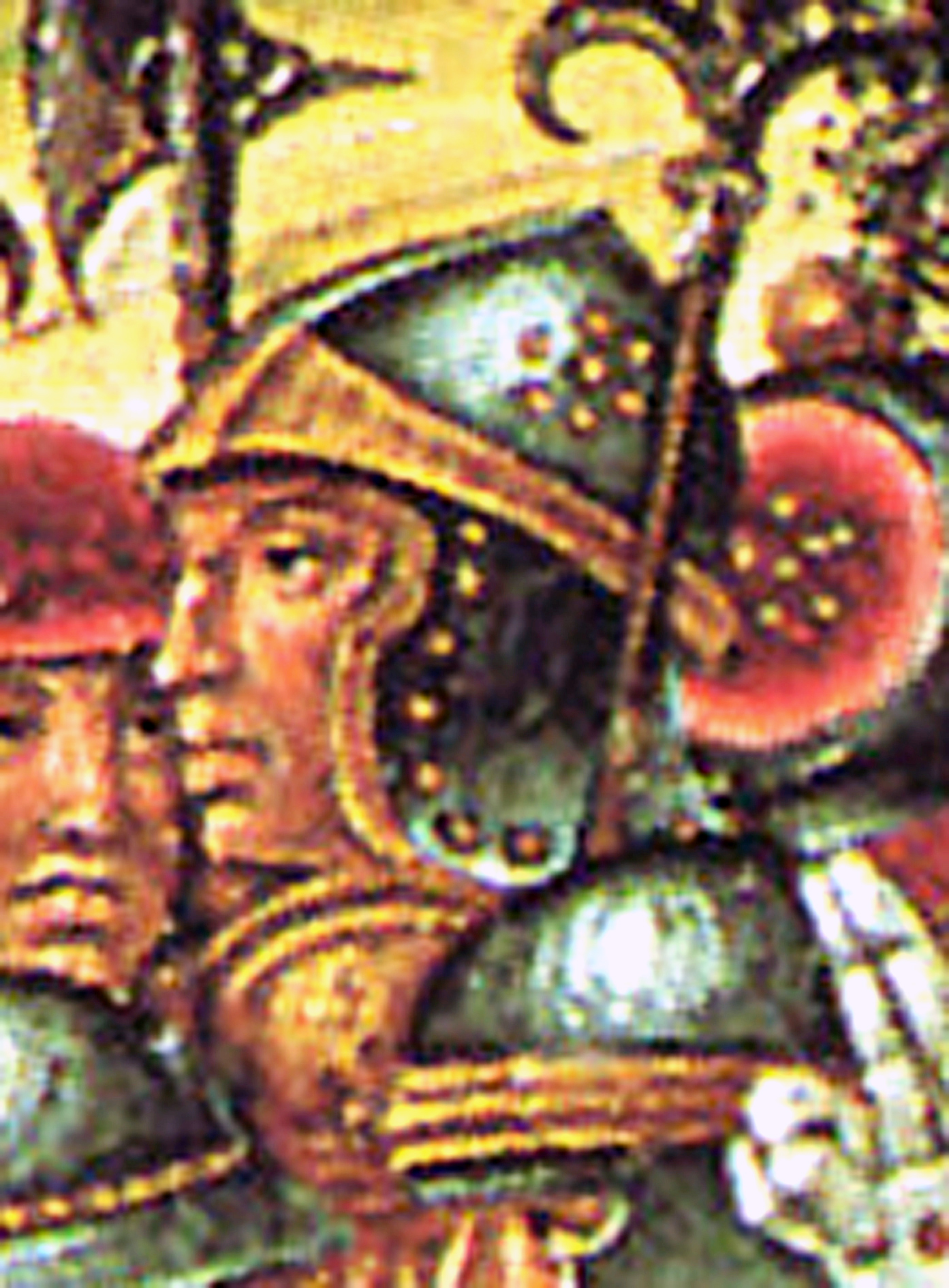 Raymond de Turenne detail